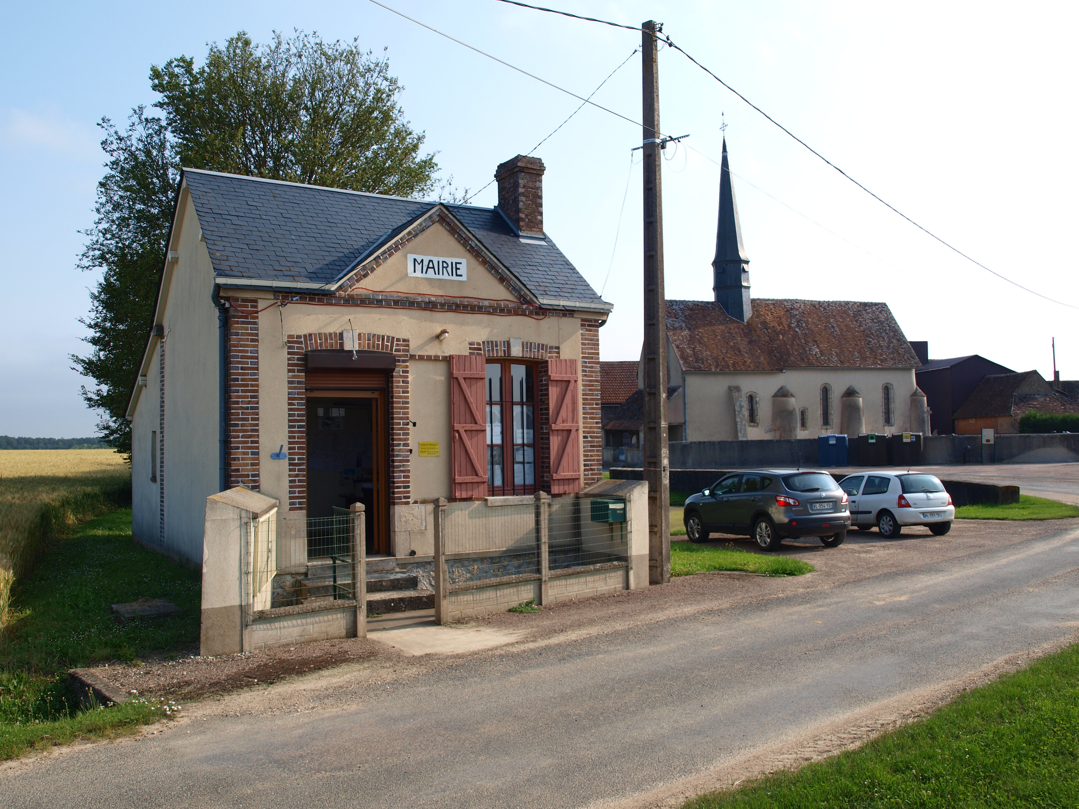 Thorailles (Loiret, France) ; mairie & église